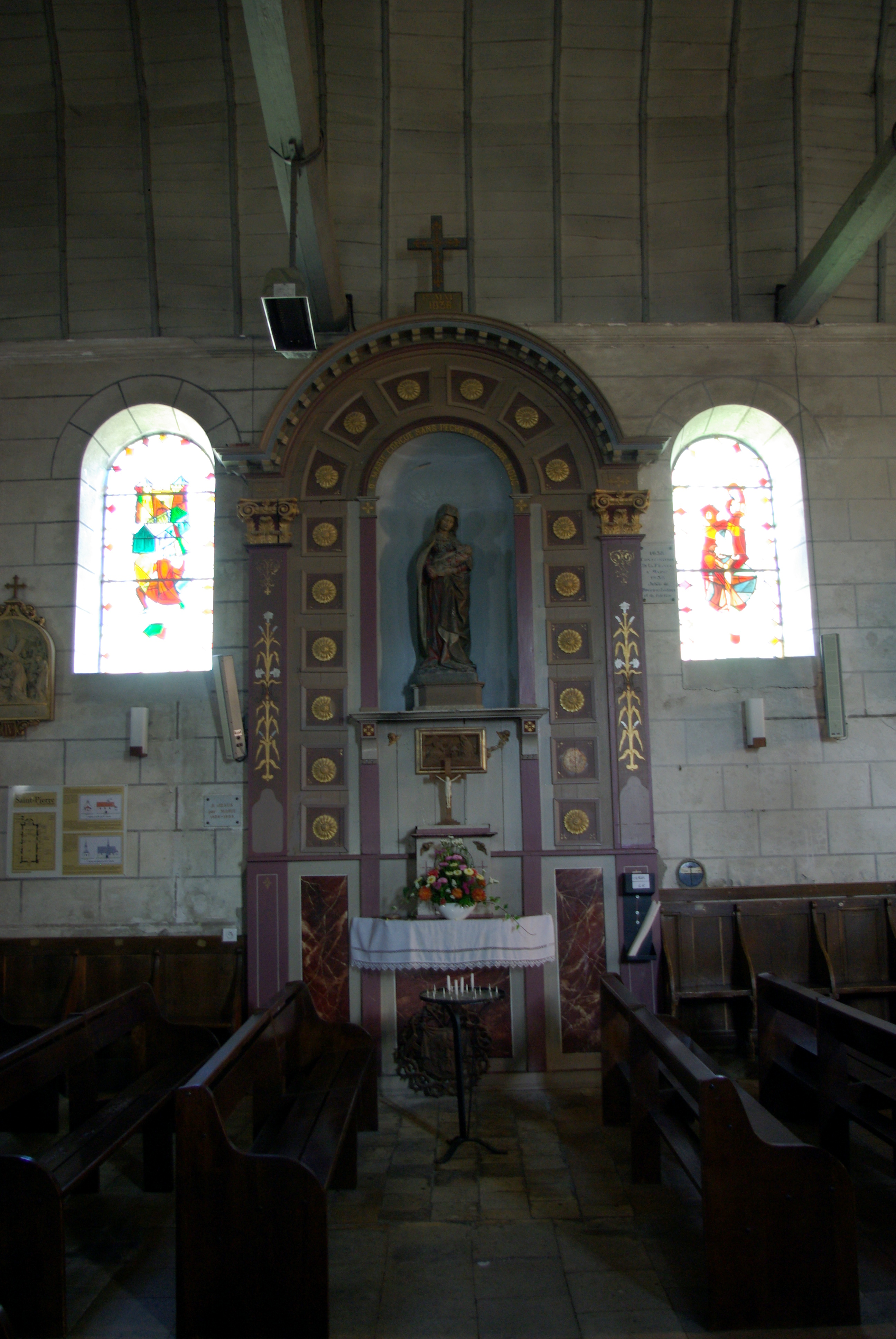 Église Saint-Pierre de Parçay-Meslay. This building is en partie classé, en partie inscrit au titre des Monuments Historiques. .